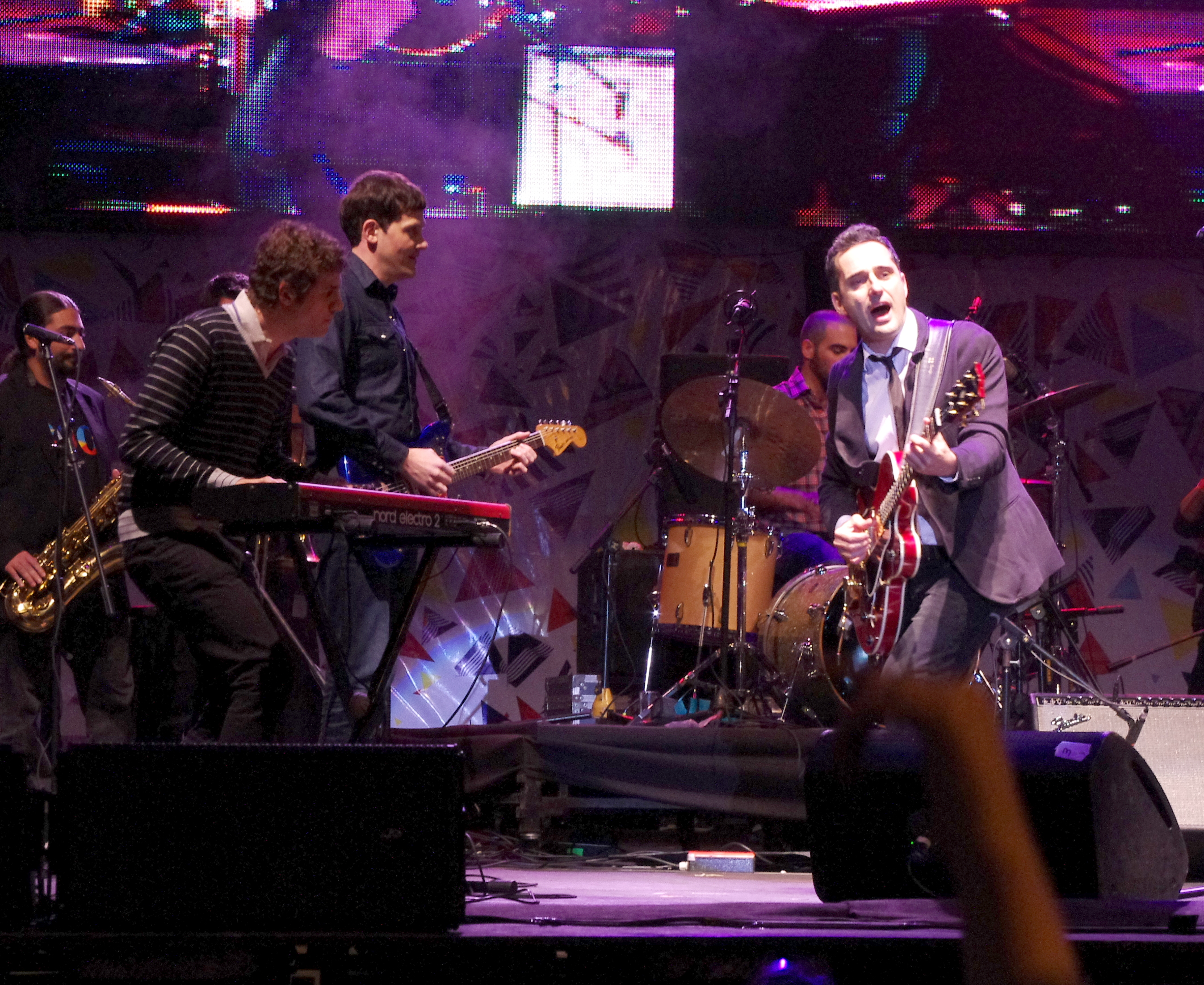 El músico uruguayo Jorge Drexler junto a Luciano Supervielle (izquierda en teclados) y Juan Campodónico (centro en guitarra), brindando un concierto en el escenario del gaucho (intersección de las Calles 18 de Julio y Constituyente, Montevideo), en el marco de los festejos en Bicentenario en Uruguay.